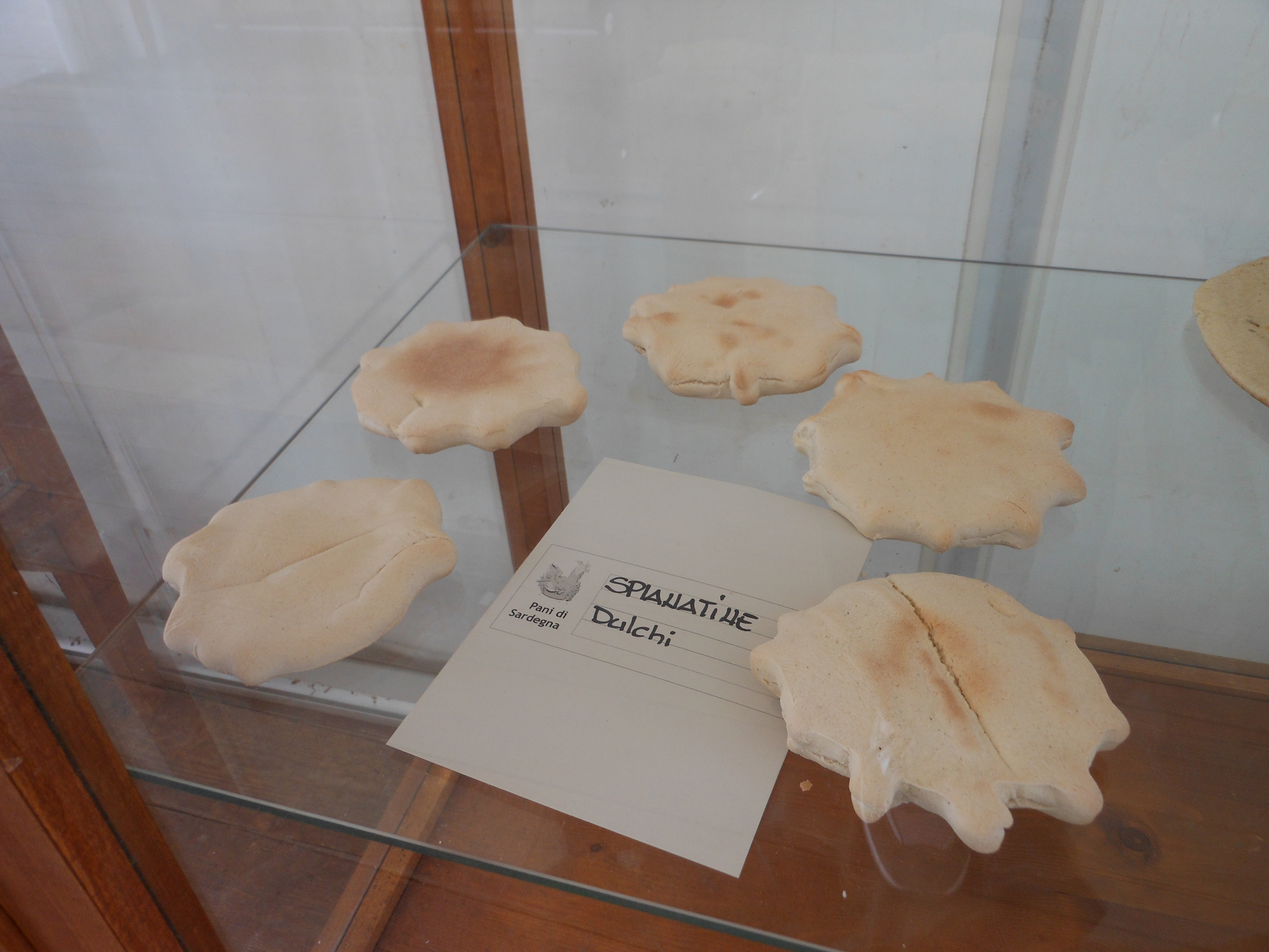 Pane tradizionale